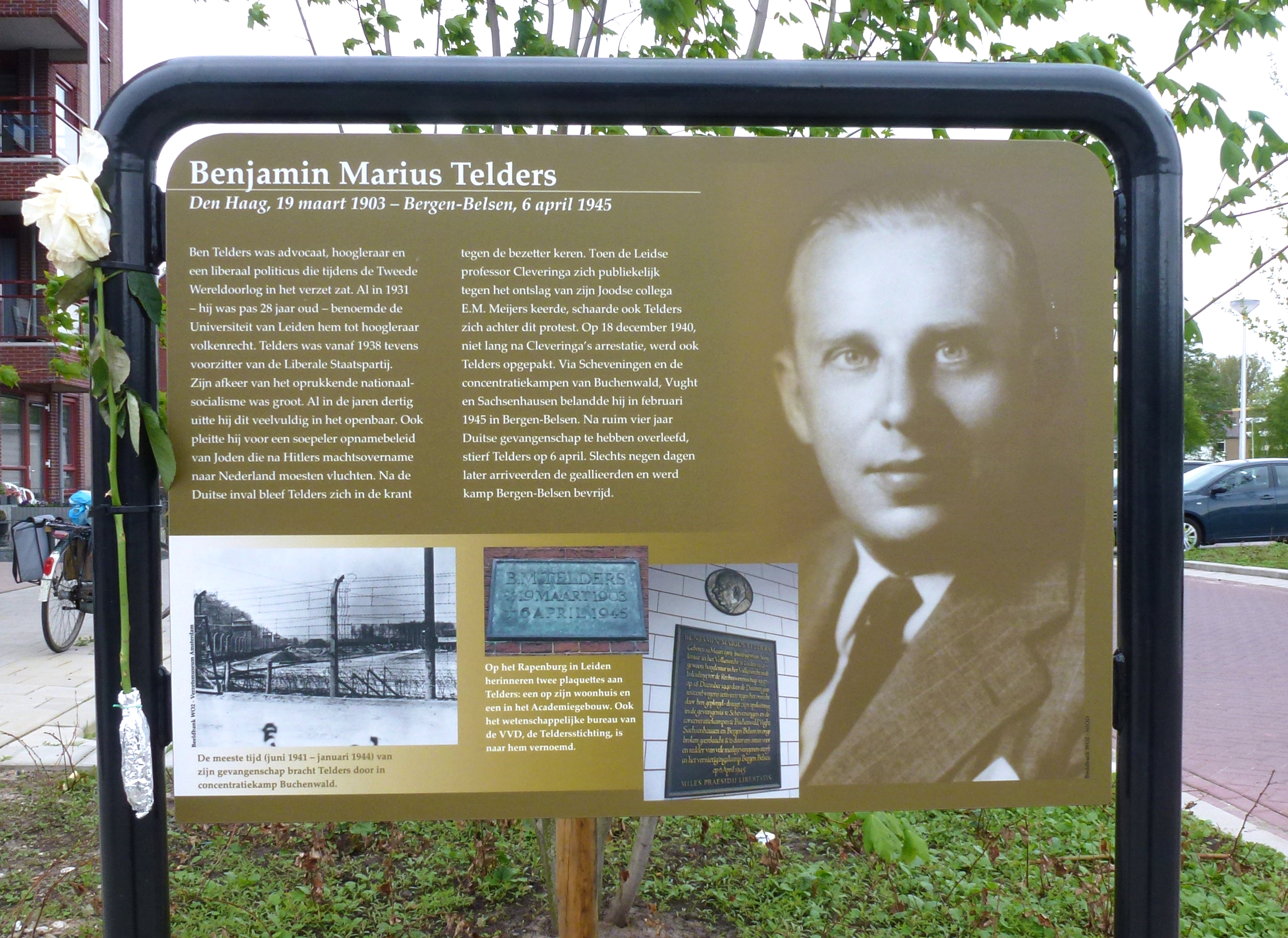 Benjamin Marius Telders. Op 10 april 2014 zijn in Oosterwei 10 van in totaal 16 borden met informatie over verzetsstrijders onthuld. In Oosterwei, een wijk in Gouda, zijn na de 2e wereldoorlog, de wederopbouw, 16 straten vernoemd naar verzetsstrijders. Veel bewoners van deze straten wisten maar weinig over de verzetshelden waarnaar de straten vernoemd zijn. Zij en anderen hebben er voor gezorgd dat nu in iedere straat een informatiebord staat, zodat de gedachtenis aan deze strijders levend blijft. (De overige 6 borden zijn in april 2018 geplaatst)